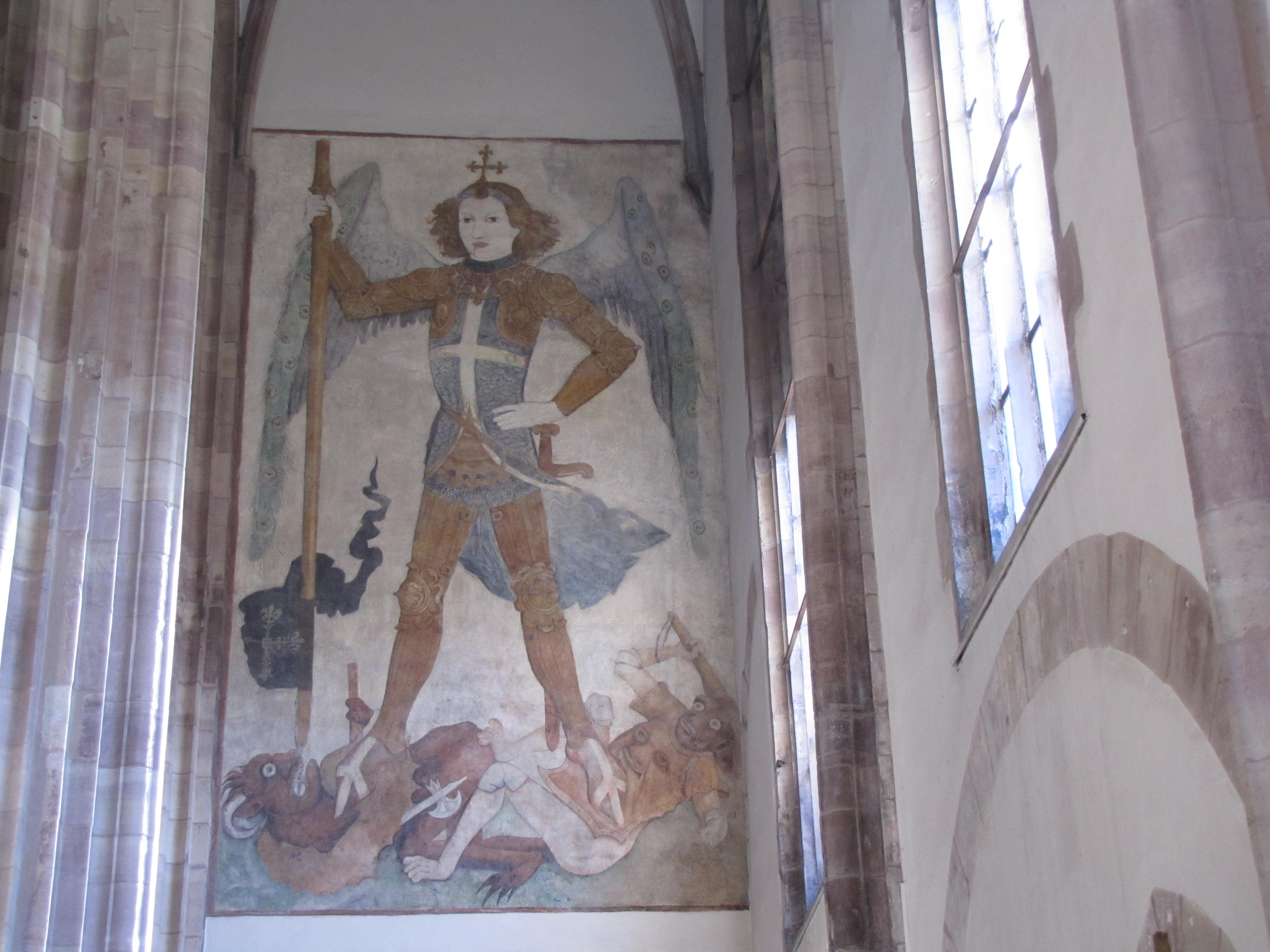 Alsace, Bas-Rhin, Église protestante Saint-Thomas de Strasbourg, 4 rue Martin-Luther (PA00085032). Peinture monumentale "St-Michel terrassant les démons" (XVe).